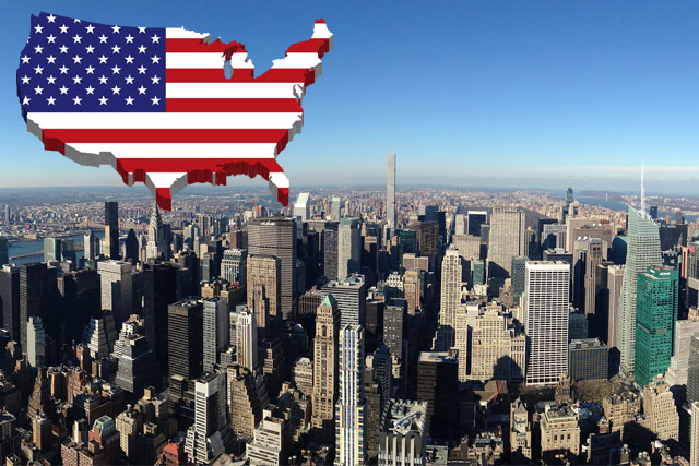 Foto de Nueva York y bandera de los Estados Unidos